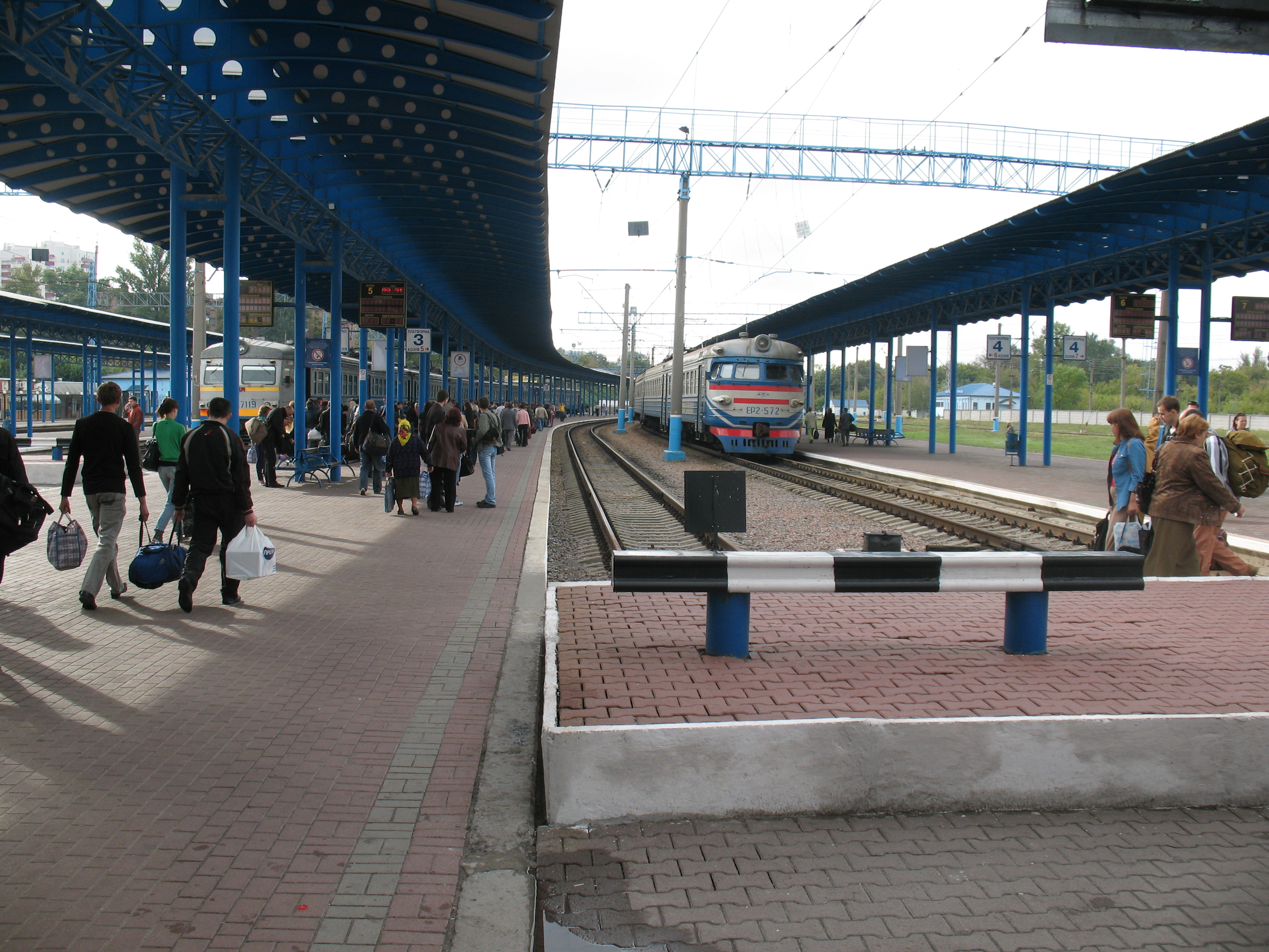 Вокзал Левада в Харькове. Вид на платформы со стороны вокзала. Слева электропоезд ЭР2Т, справа - ЭР2-572, УЗ(Украинской зализныци, ж.д.)